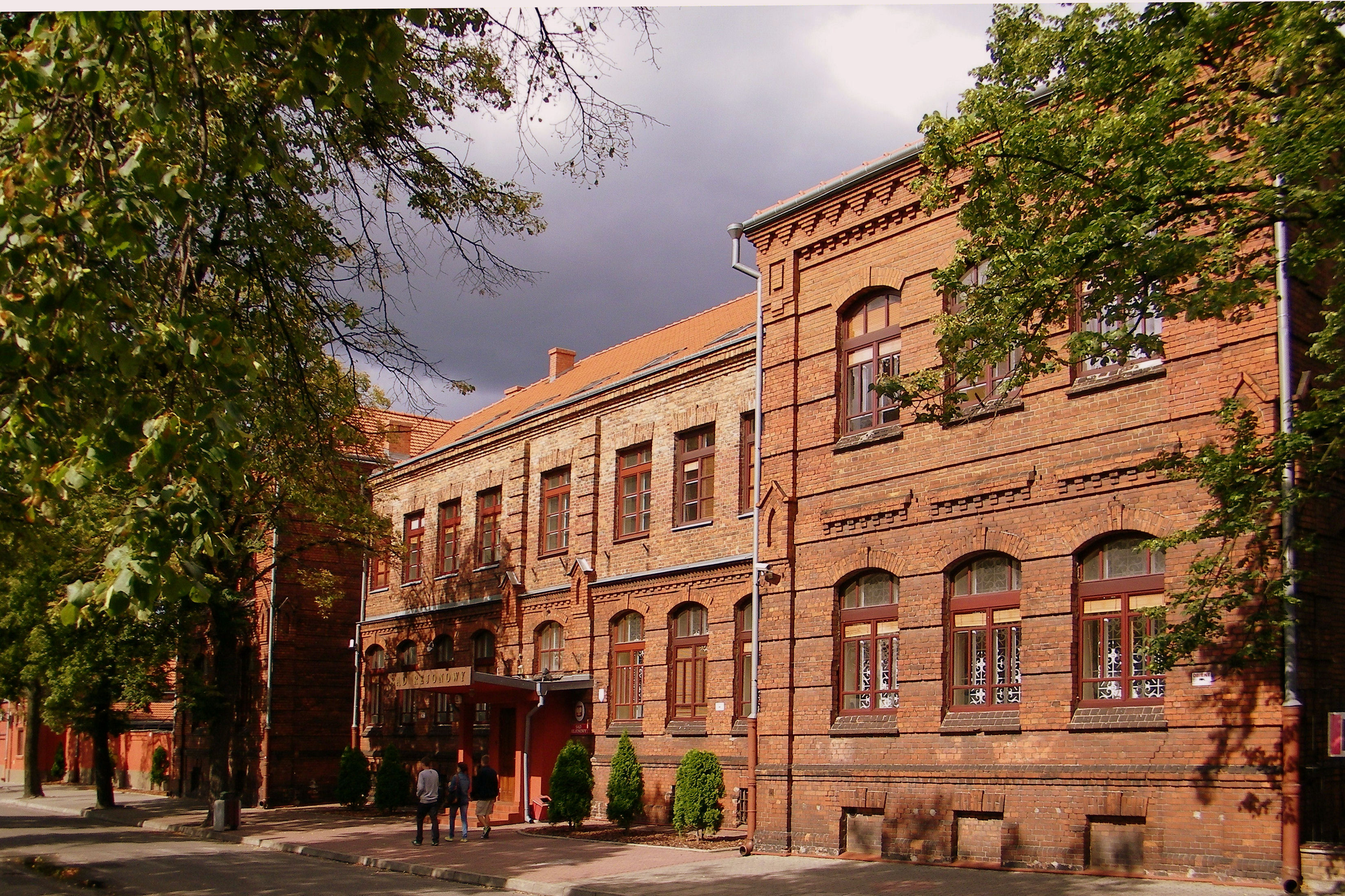 zespół sądu, XIX/XX, 1930-1935: sąd, ob. wojewódzki; sąd, ob. rejonowy; budynek administracyjny; skwer (zieleń towarzysząca) , Włocławek, ul. Kilińskiego 20 / Wojska Polskiego 22, miasto Włocławek\